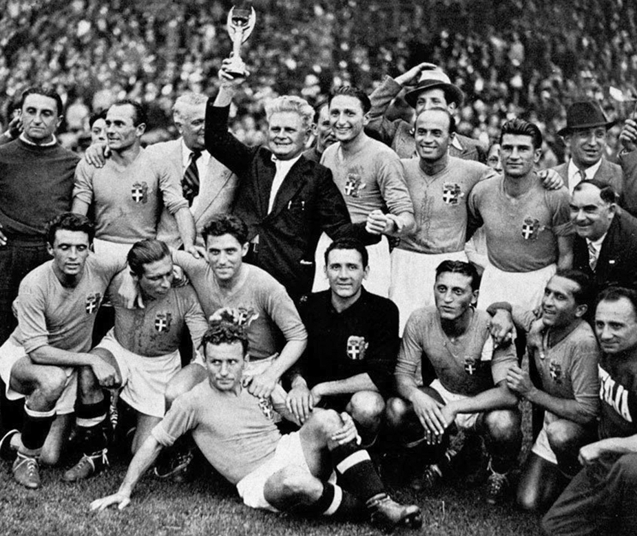 L'équipe d'Italie championne du monde de football, le 19 juin 1938 à Paris.